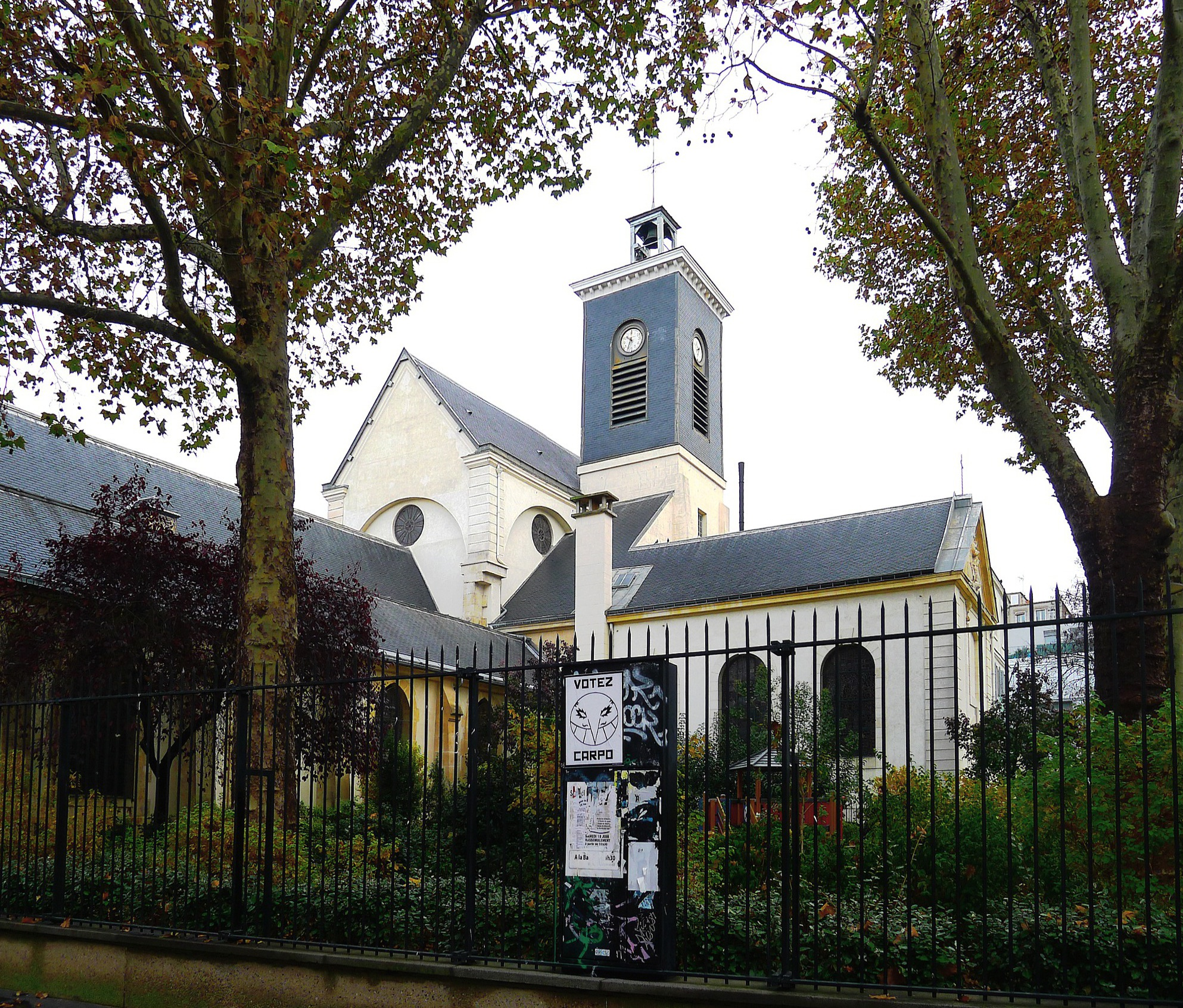 Église Sainte-Marguerite - Paris XI